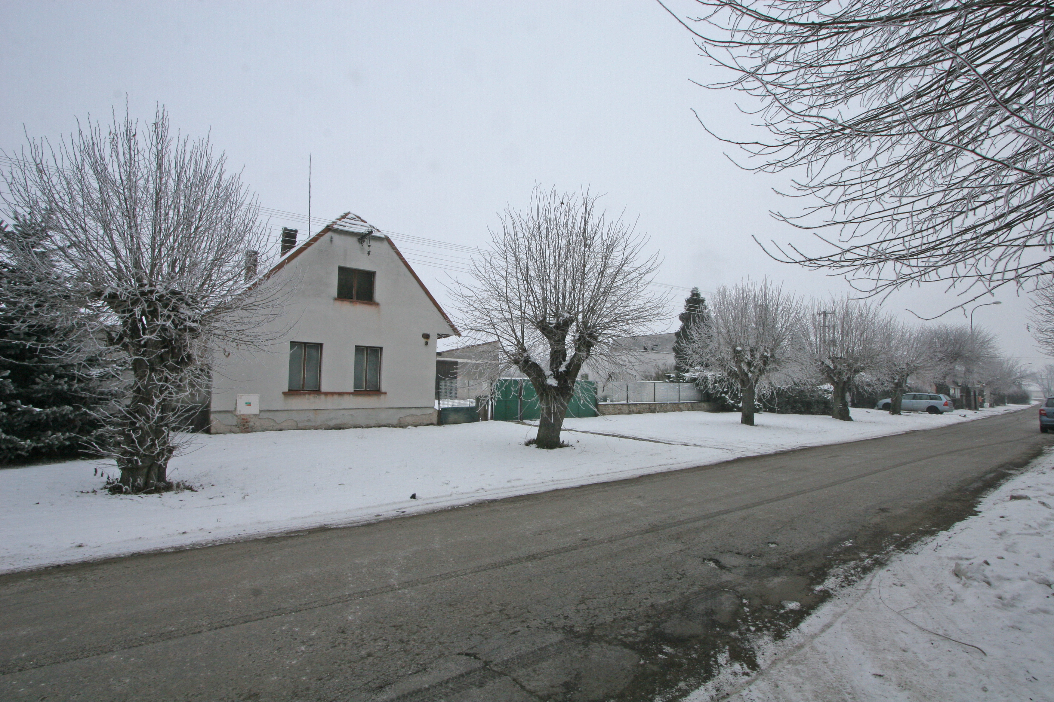 Prachovice čp. 4 a 5